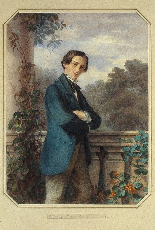 Selbstbildnis des Schweizer Künstlers Wilhelm Heinrich Füssli